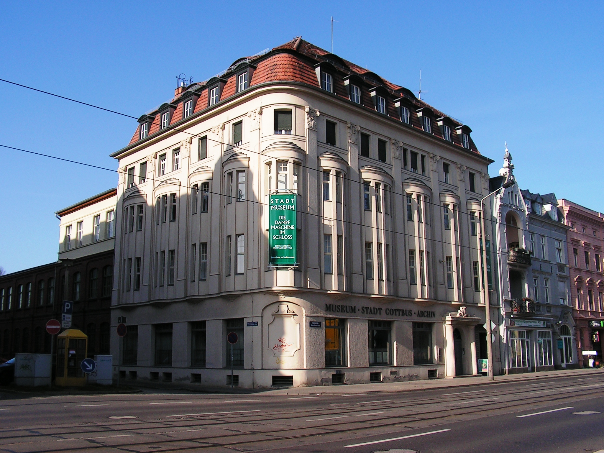 Im Gebäude in der Bahnhofstraße 52 (Ecke Rudolf-Breitscheid-Straße) ist das Cottbuser Stadtmuseum und -archiv untergebracht.